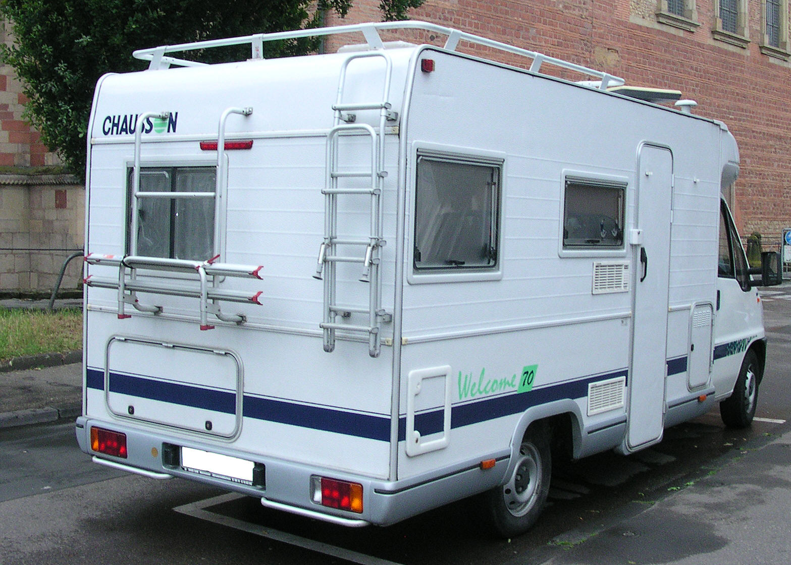 Chausson Wohnmobil „Welcom 70“